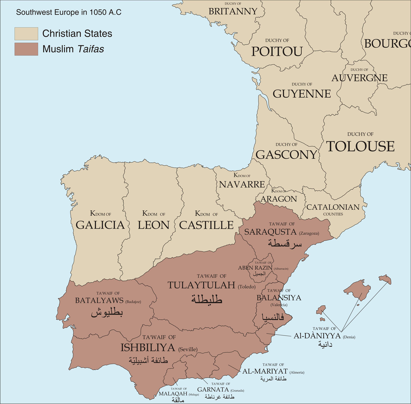 (Descrición: Mapa politico do Suroeste europeo arredor do ano 1050 d.C, onde apreciamos reinos cristiáns e taifas musulmanas.